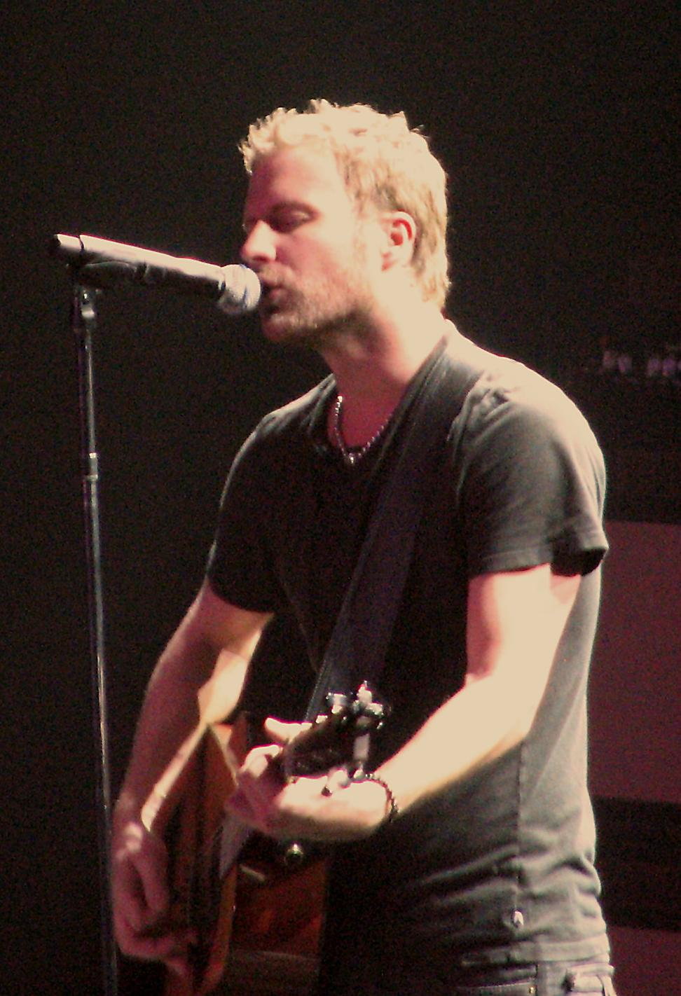 Dierks Bentley